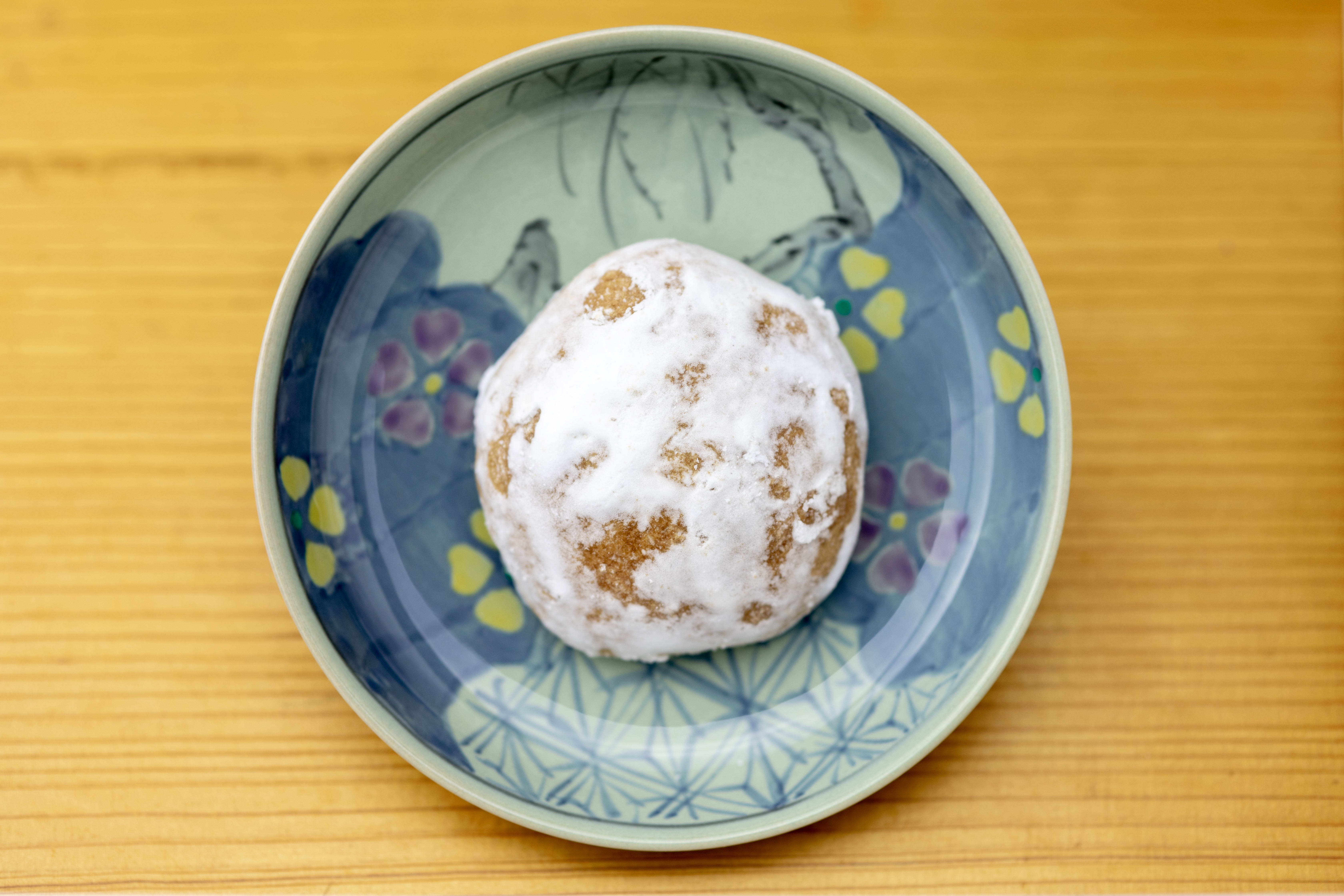 群馬県桐生市で親しまれているお菓子の花ぱん。